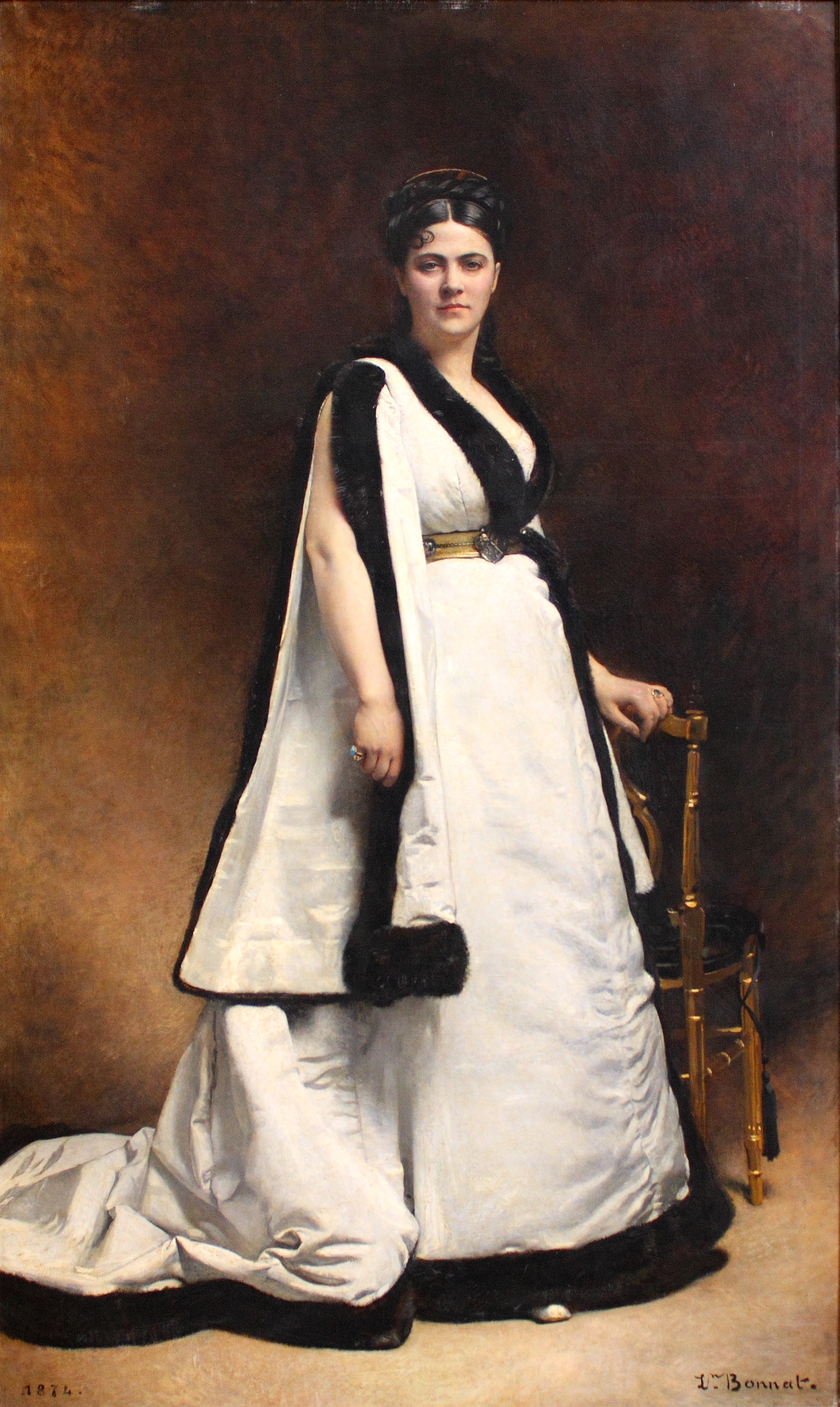 Depicted person: Alix Marie Adélaïde Pasca (1835-1914)[1]